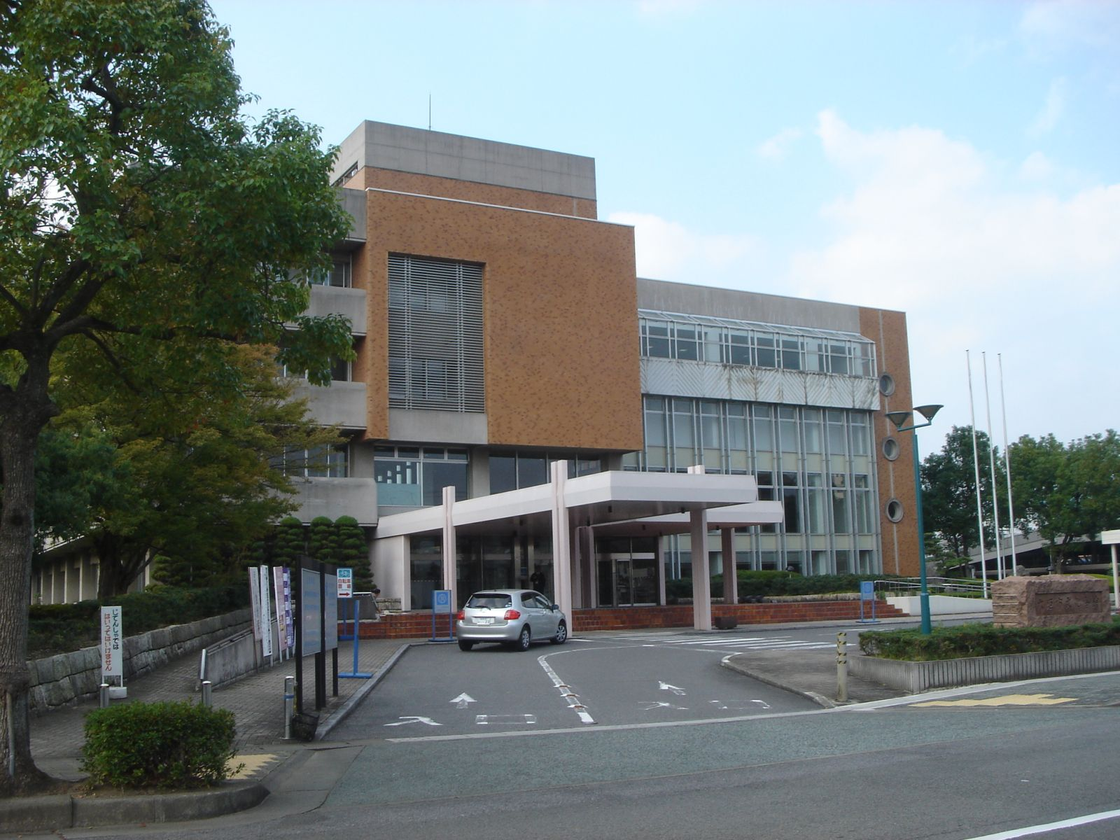 Cultural Hall in Suitopai Center（スイトピアセンターの文化会館）,Ogaki,Gifu,Japan(岐阜県大垣市)で撮影。